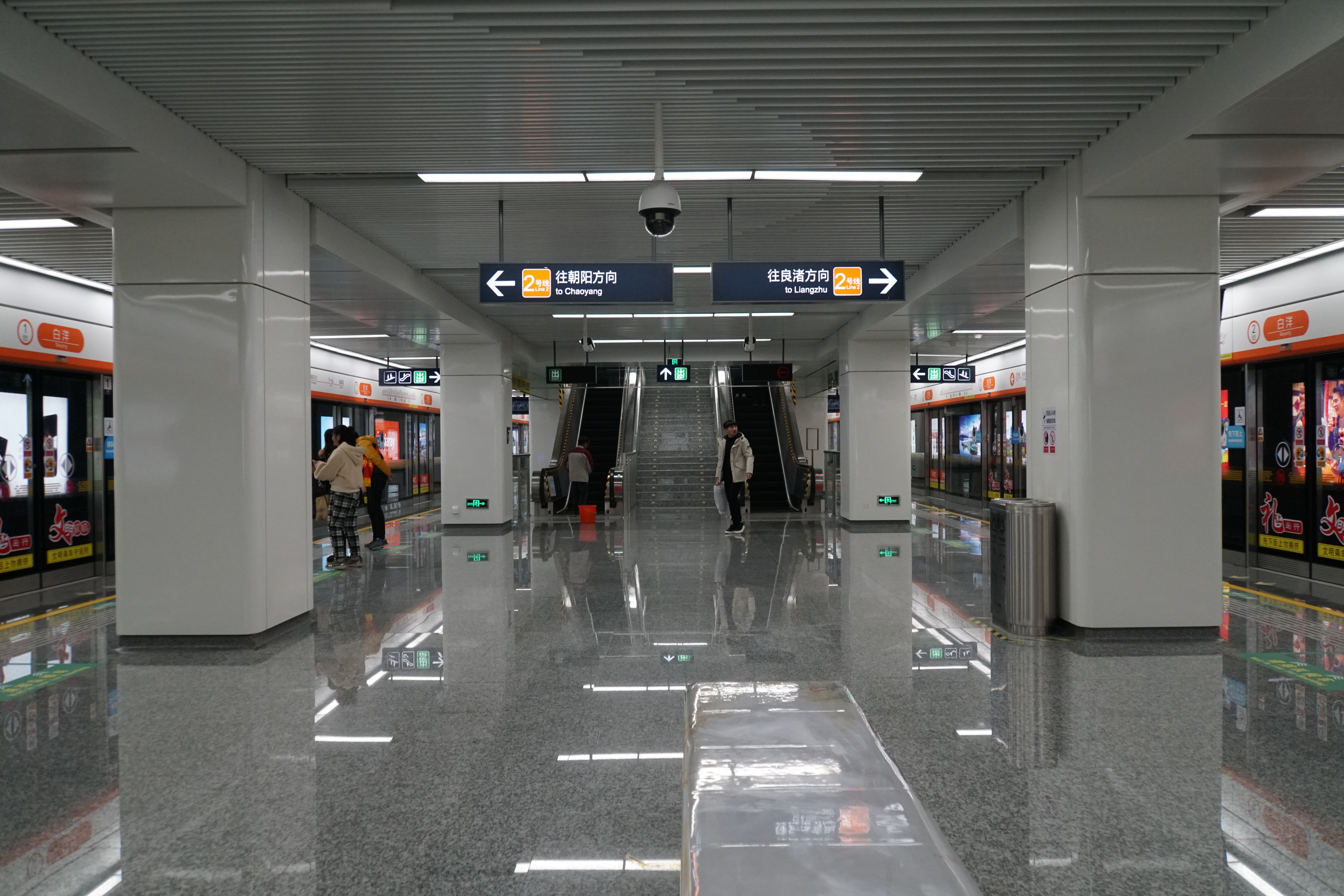 白洋站站台